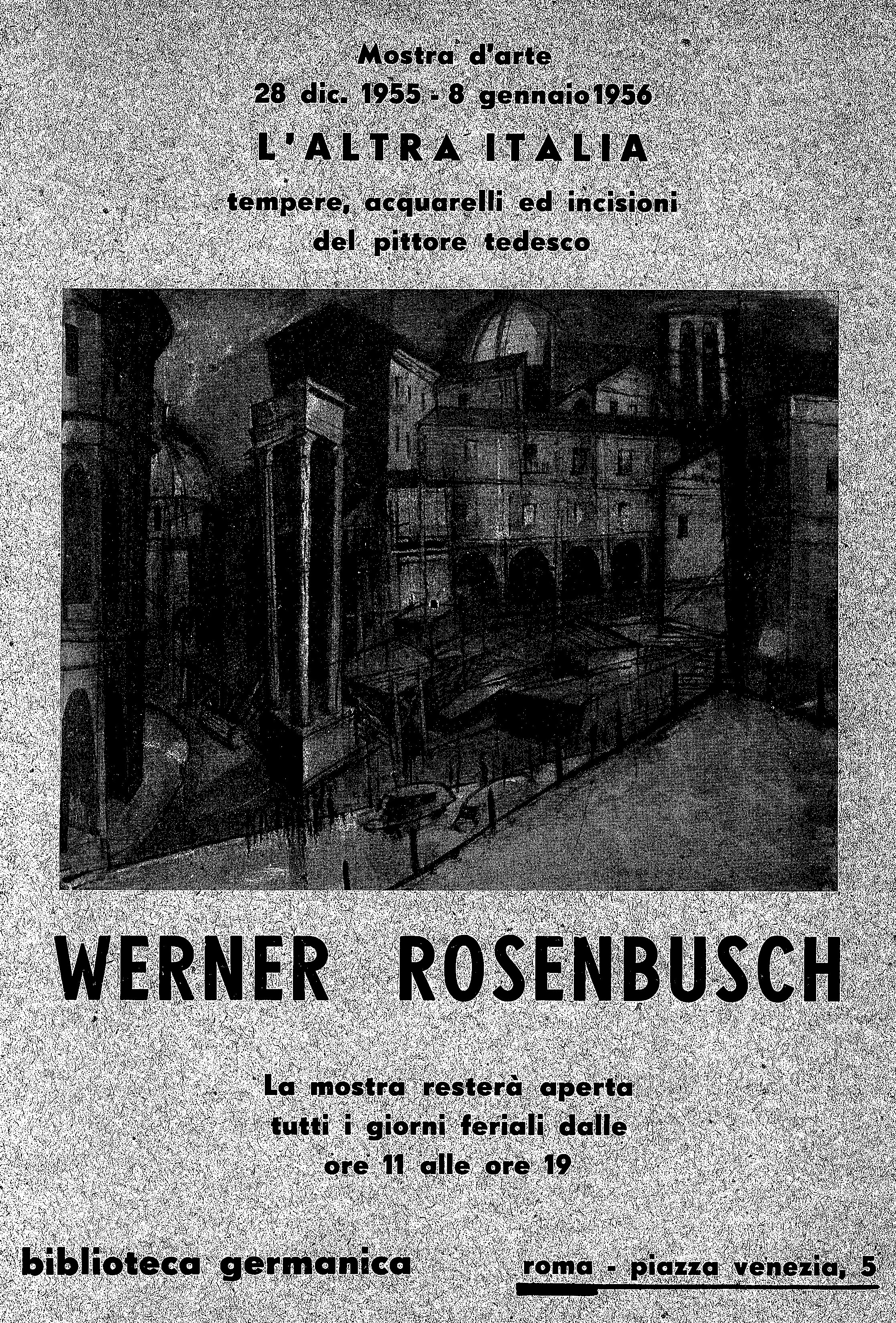 Ausstellungsplakat: L’altra Italia, tempere, acquarelli ed incisioni del pittore tedesco Werner Rosenbusch, 28.12.55-8.1.56 in der Biblioteca Germanica in Rom, Dokument aus dem Nachlass Werner Rosenbusch, Rechteinhaber Fabian Rosenbusch